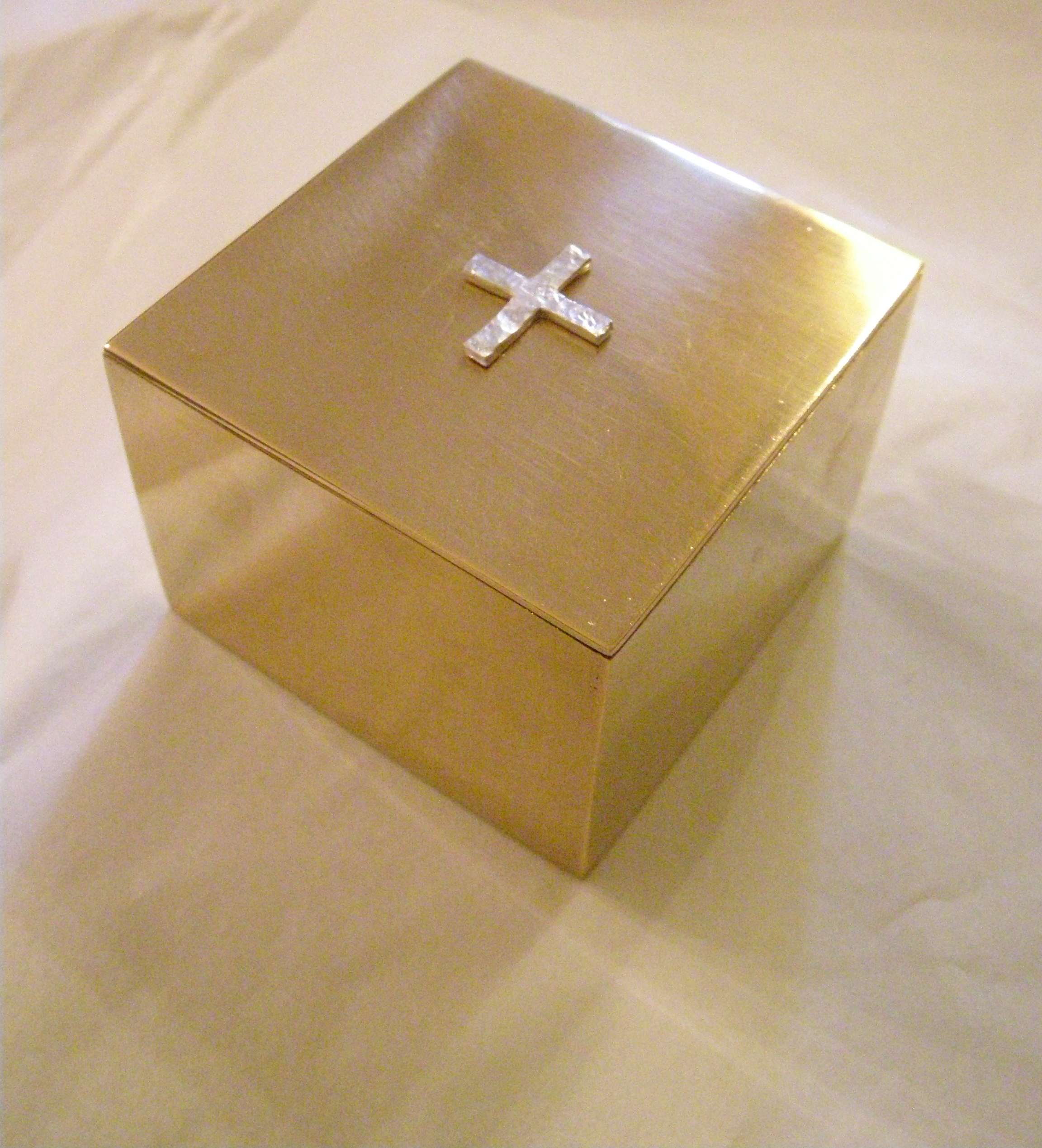 Reliquaire en laiton doré avec une croix en argent massif martelée sur le couvercle. Réalisation Christophe Evellin